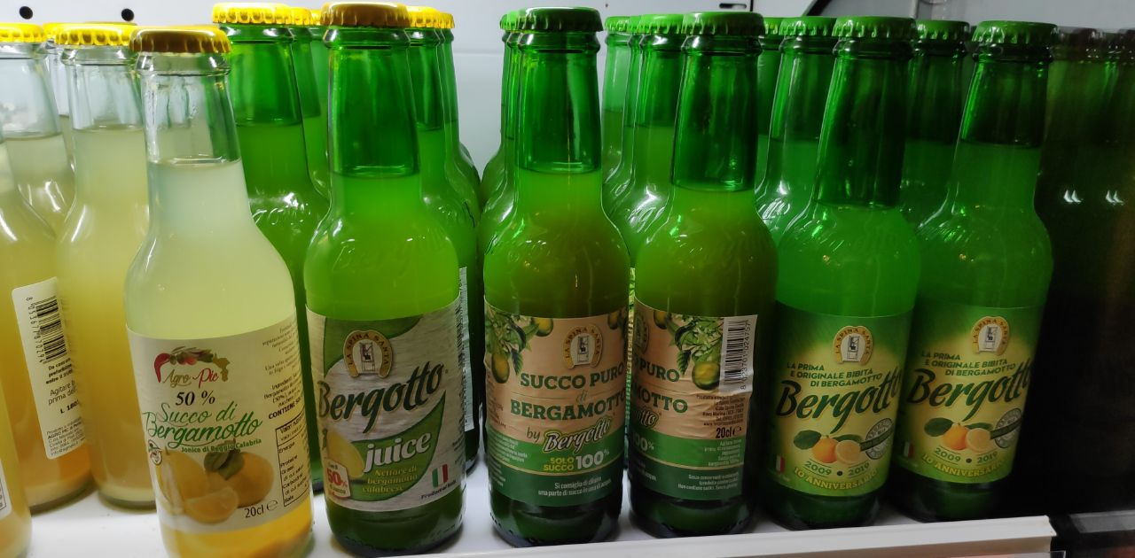 Bibite al bergamotto (2019) tra cui a partire da sinistra: Succo di bergamotto, bergotto, succo puro di bergamotto e bergotto anniversario (2009-2019)